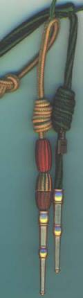 fourragères du 2e R.I.Ma (fourragère aux couleurs du ruban de la médaille militaire, avec olive aux couleurs du ruban de la Croix de guerre 1914-1918 et olive aux couleurs du ruban de la Croix de guerre 1939-1945, puis la fourragère aux couleurs du ruban de la croix de la libération).